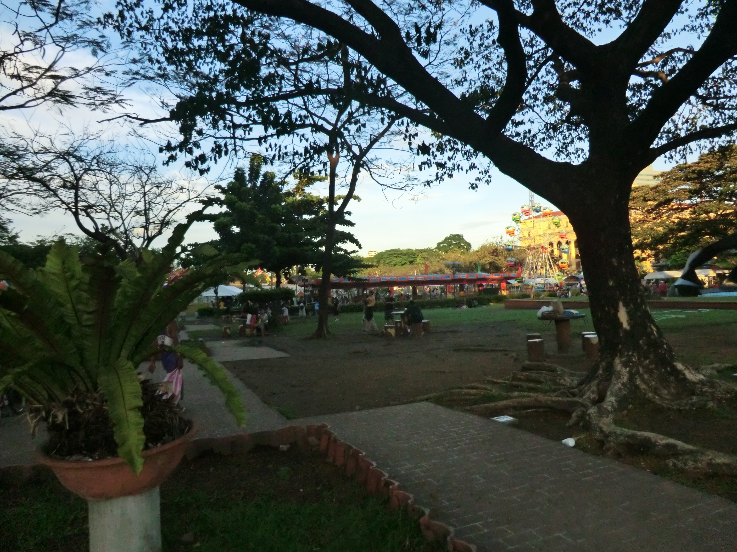 666, Ermita, Manila, Metro Manila, Philippines